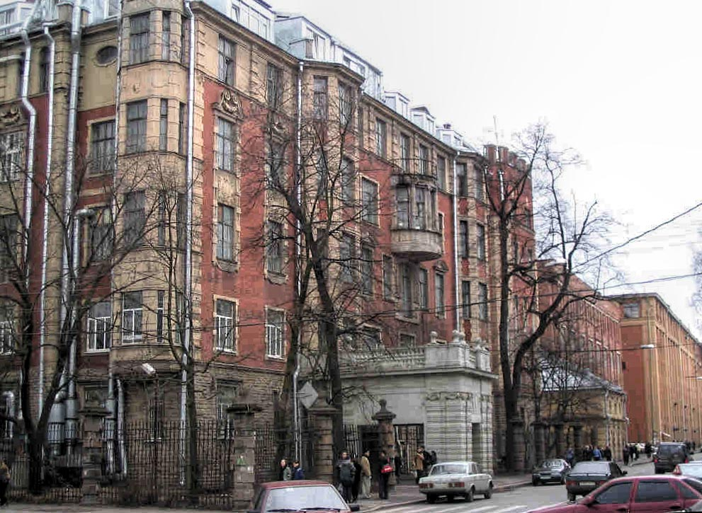 Особняк Трусевича (ул. Профессора Попова, д. 4, Санкт-Петербург)